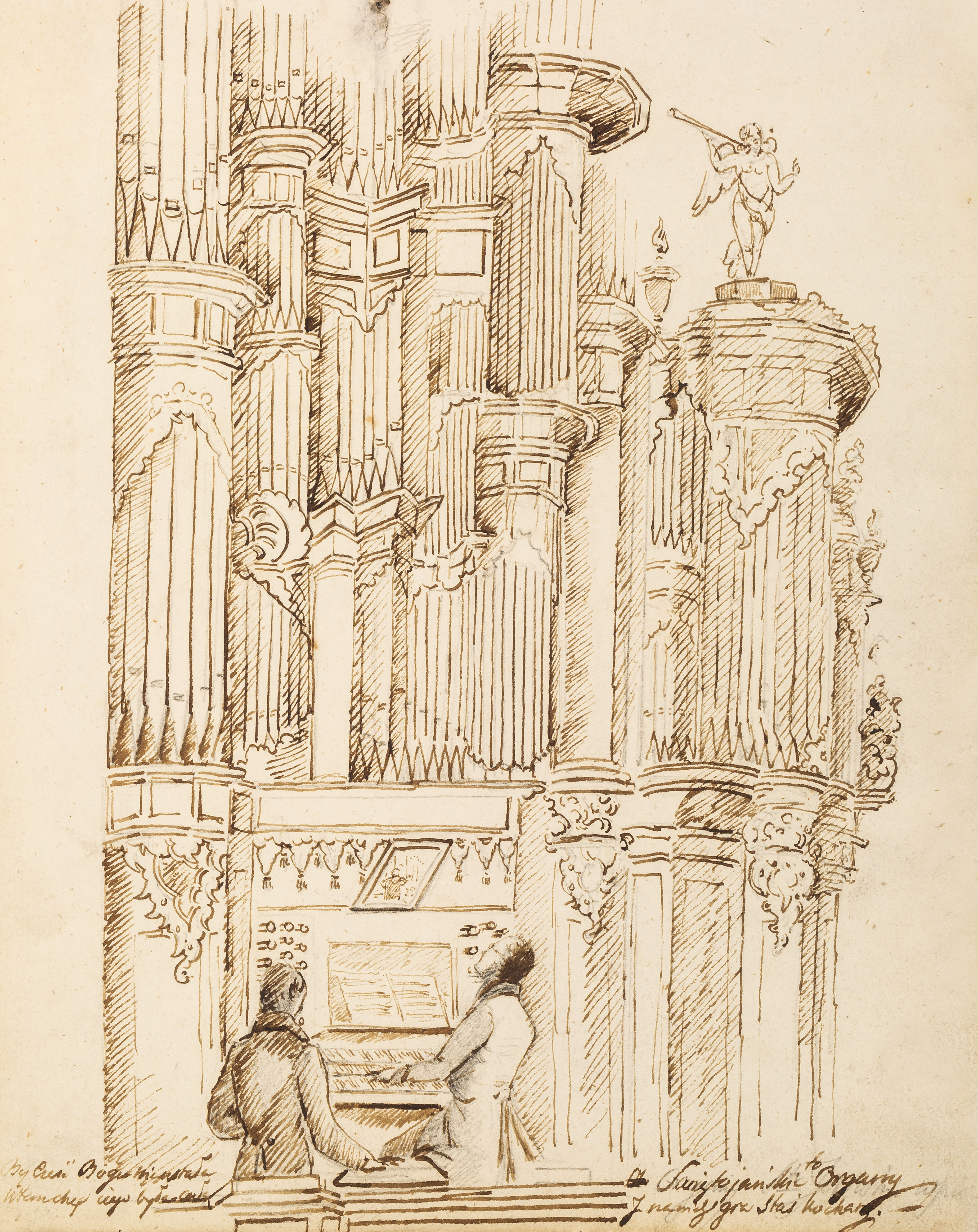 Беларуская (тарашкевіца): Вільня (Vilnia), вуліца Сьвятаянская (vulica Śviatajanskaja). Касьцёл Сьвятых Яна Хрысьціцеля і Яна Апостала і Эвангеліста, Станіслаў Манюшка (Stanisłaŭ Maniuška)